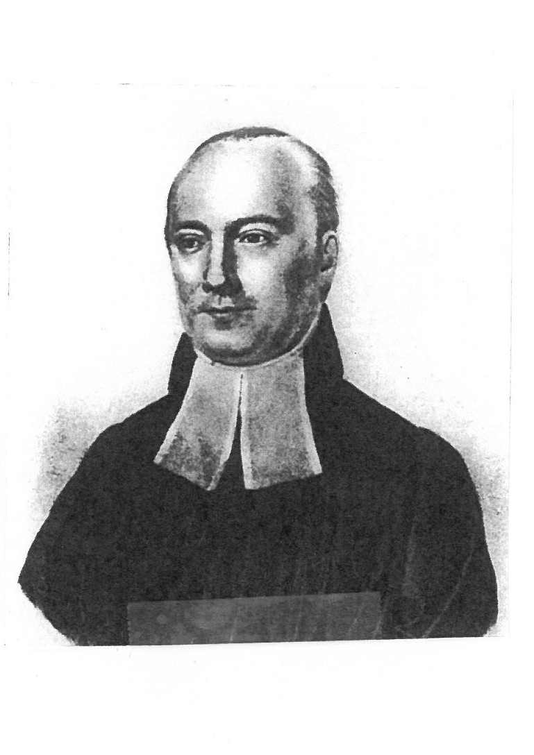 Der Frankfurter lutherische Geistliche Alexander Stein.